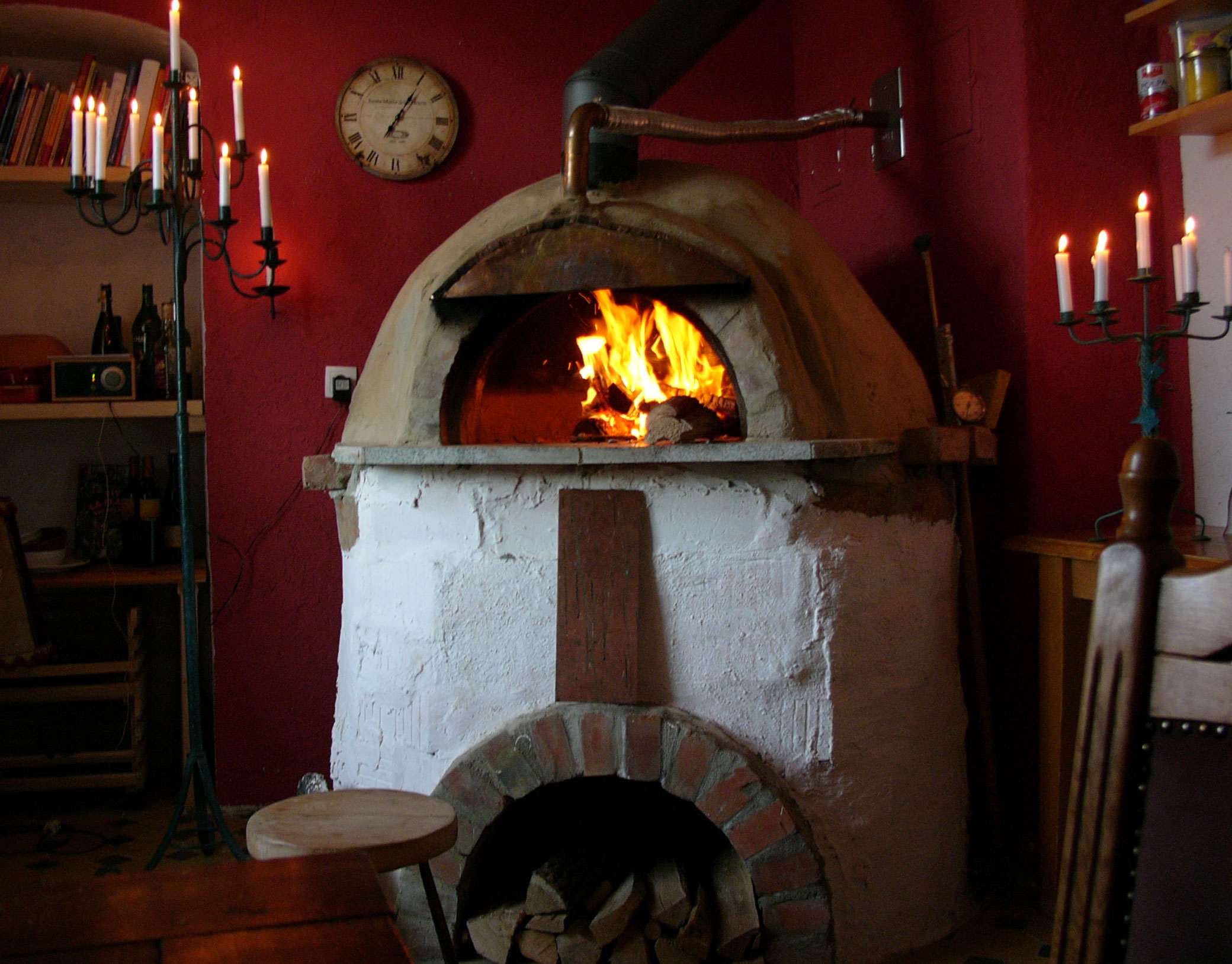 Hobbybackstube mit Lehmbackofen